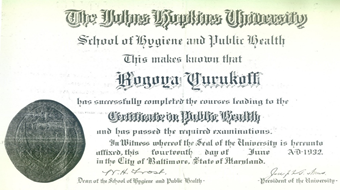 диплом на Джон Хопкинс университет